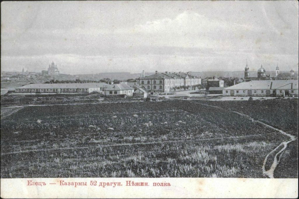 Казармы 52 драгунского Нежинского полка в Ельце. Открытка начала XX века